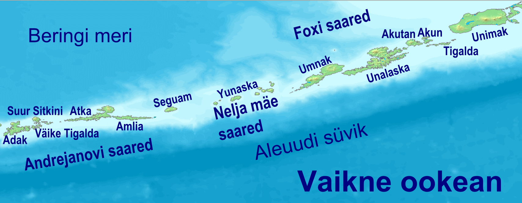 Aleuudide idaosa kaart. Tehtud kaardi alusel